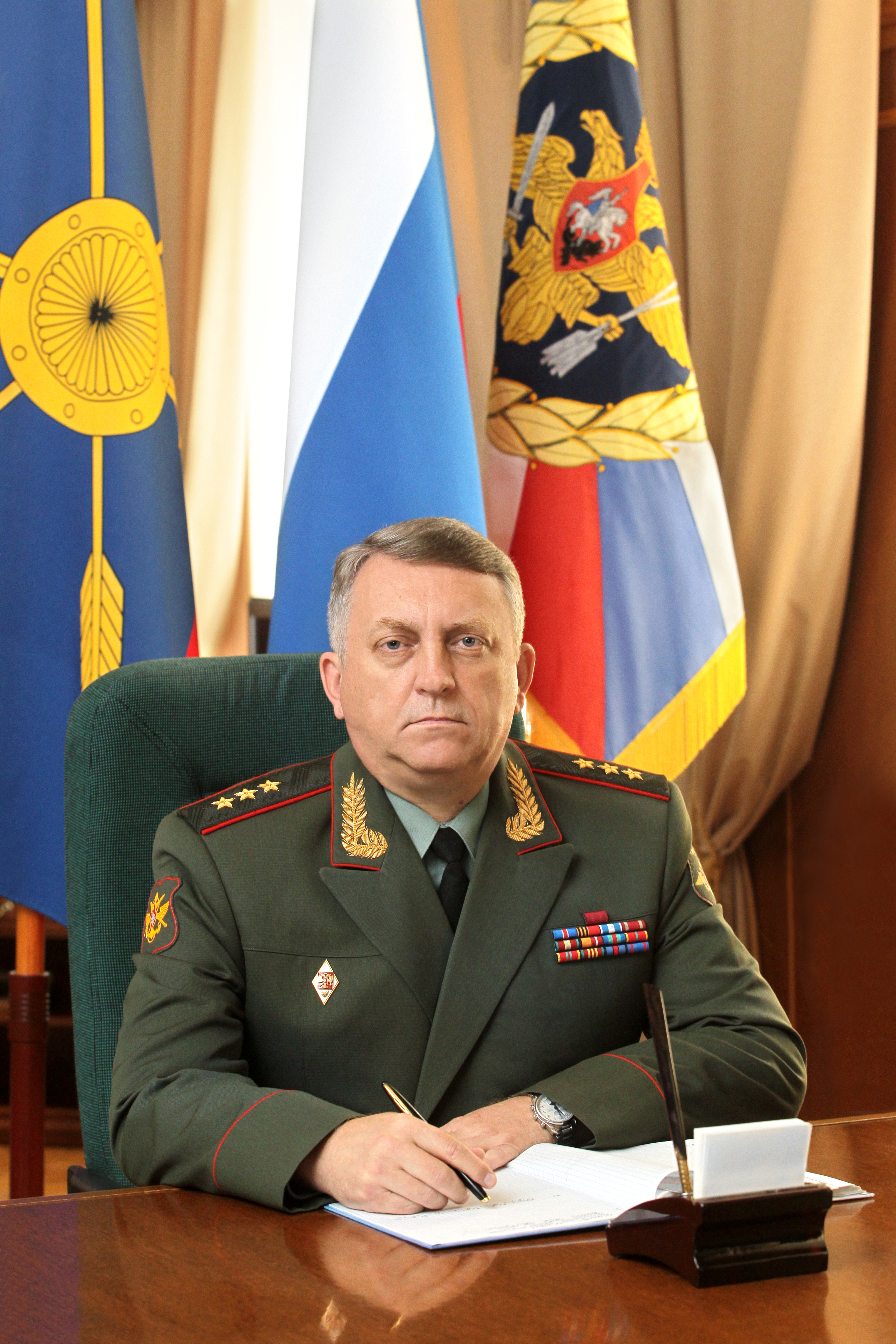 Командующий Ракетными войсками стратегического назначения генерал-полковник Каракаев Сергей Викторович